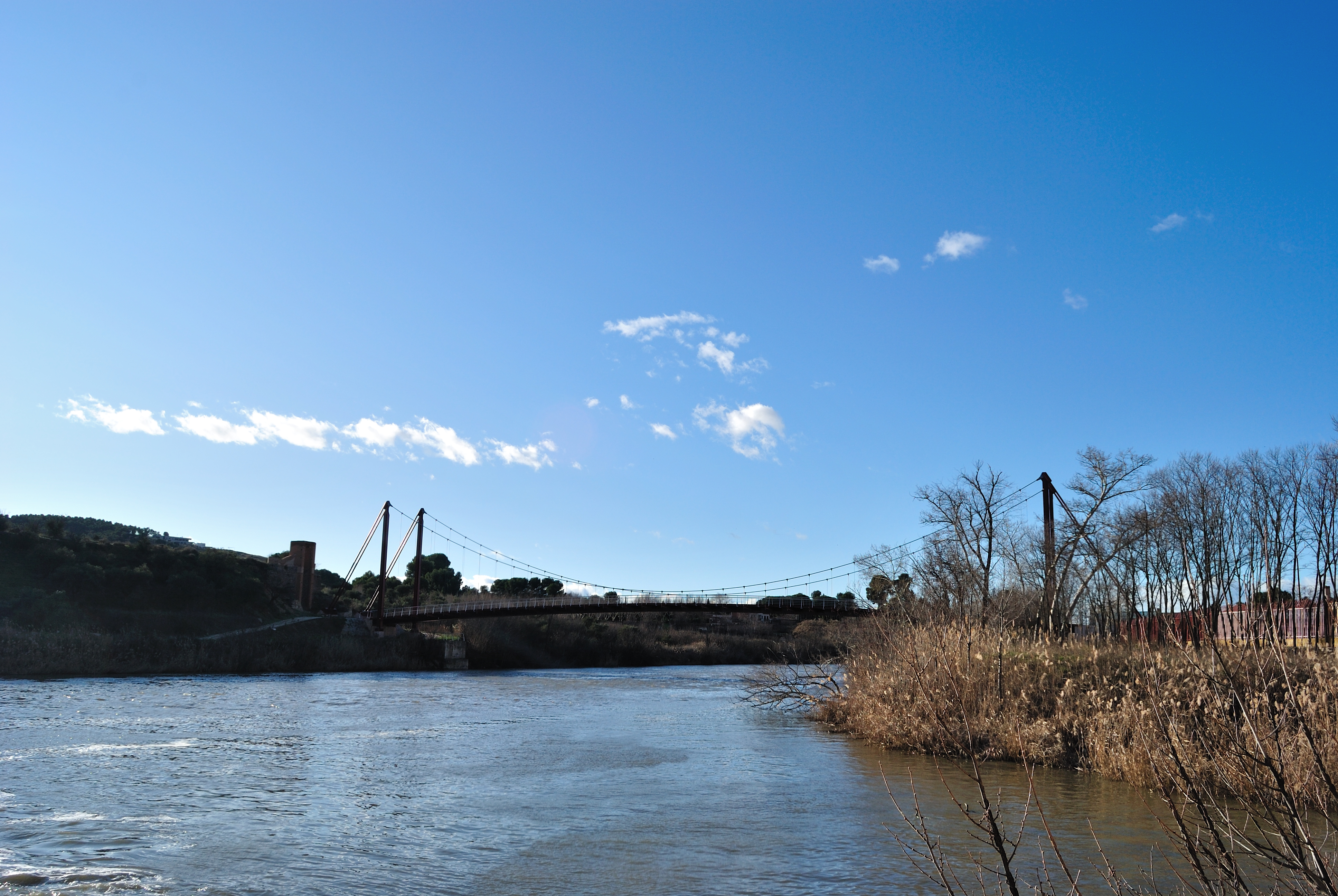 Comunicaba los terrenos de la Fábrica de Armas a ambos lados del río Tajo. Actualmente, forma parte del Campus Tecnológico de Toledo de la Universidad de Castilla-La Mancha.